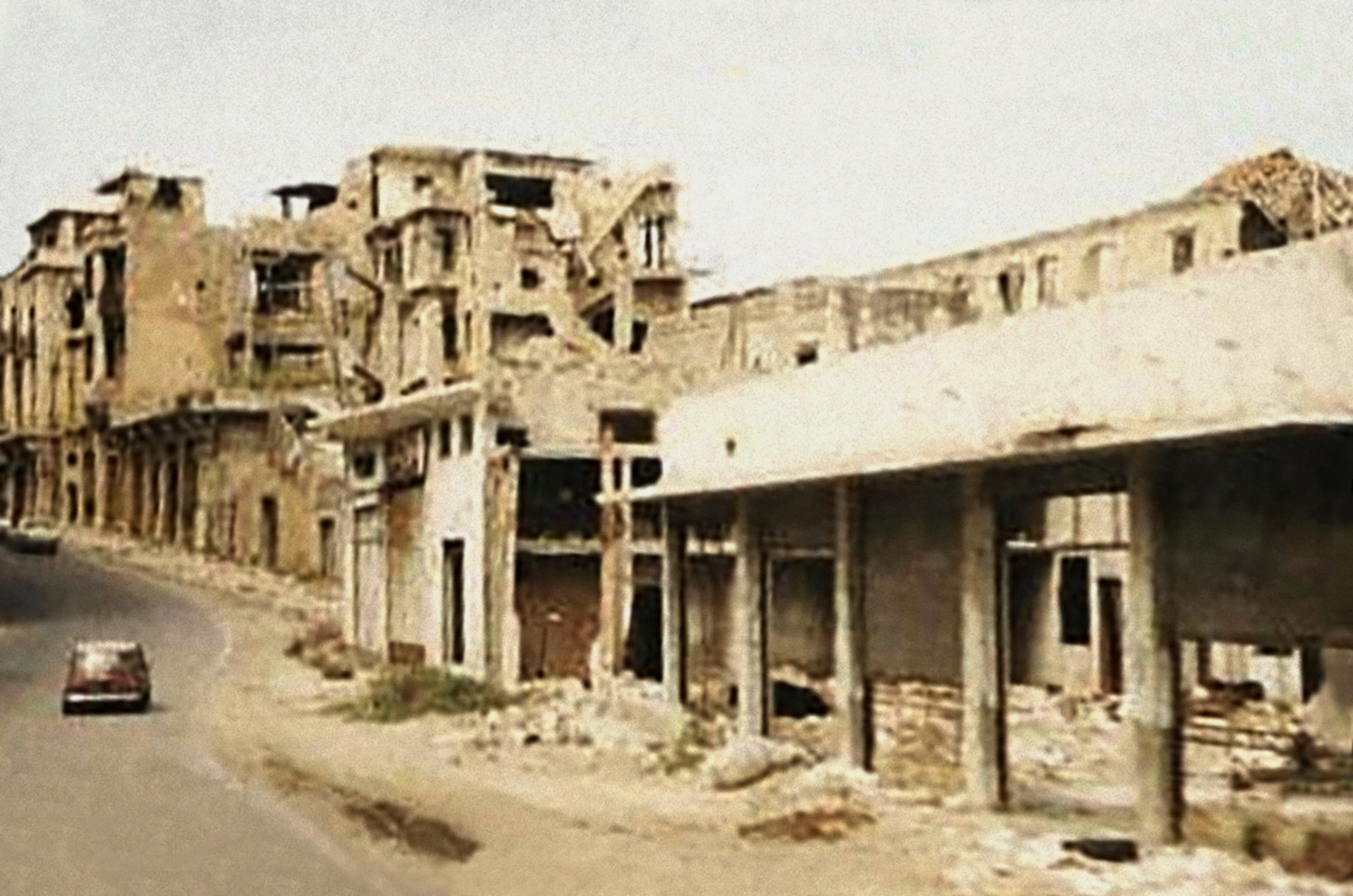 Beirut in april 1978